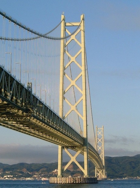 Akashi-Bridge